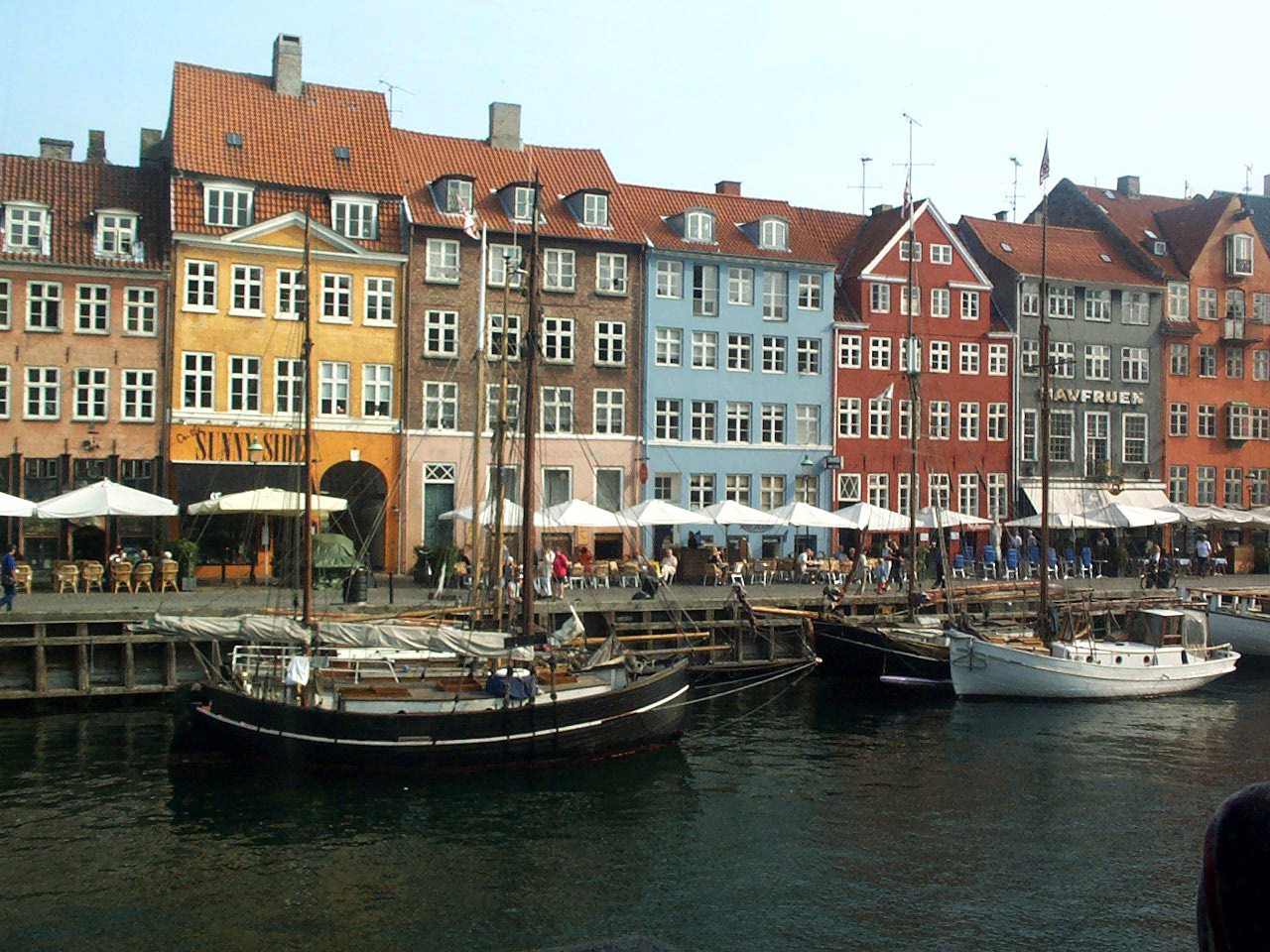 Nyhavn